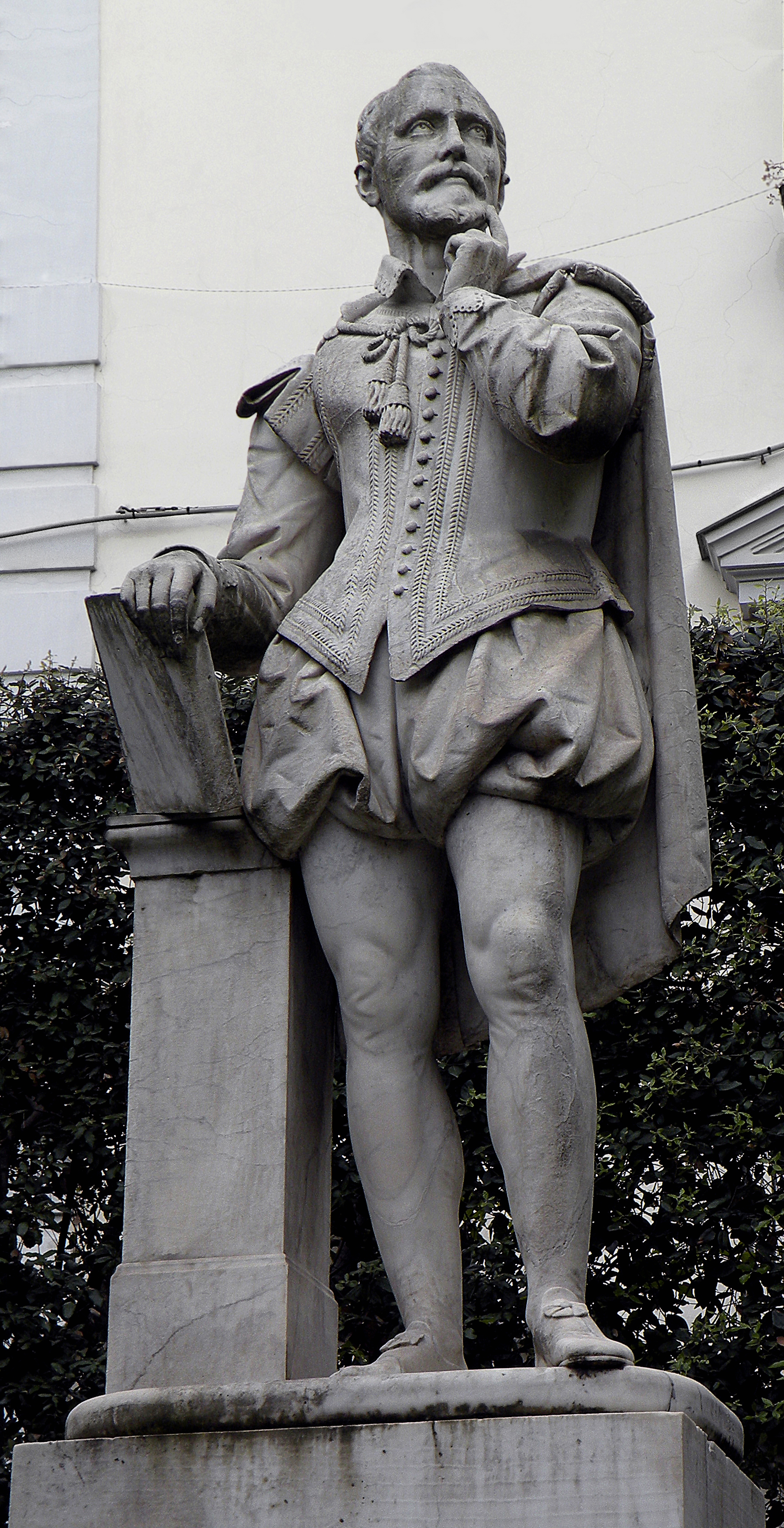 Sorrent.Torquato Tasso ( di Gennaro Calì)